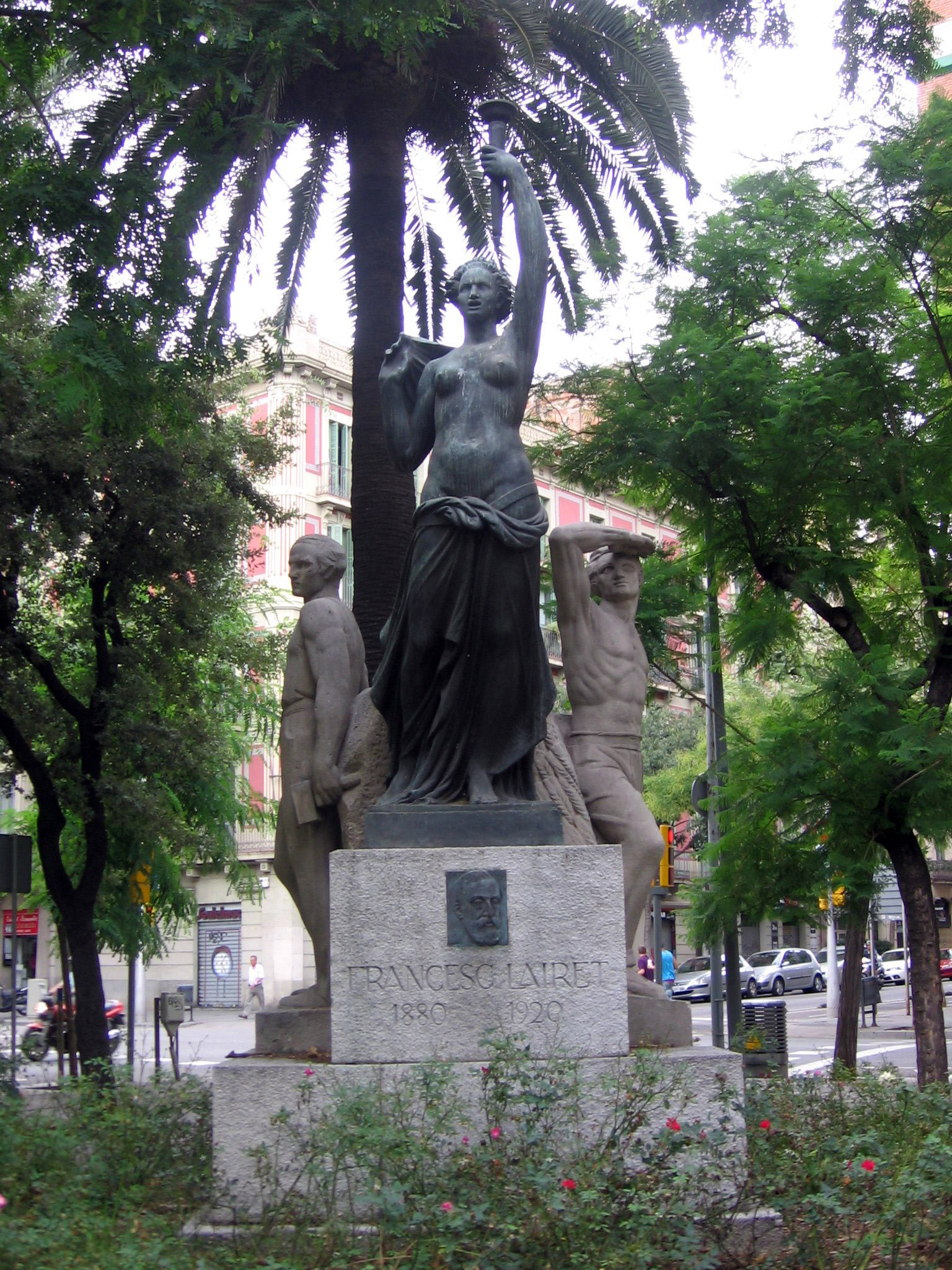 A Francesc Layret (Frederic Marès).